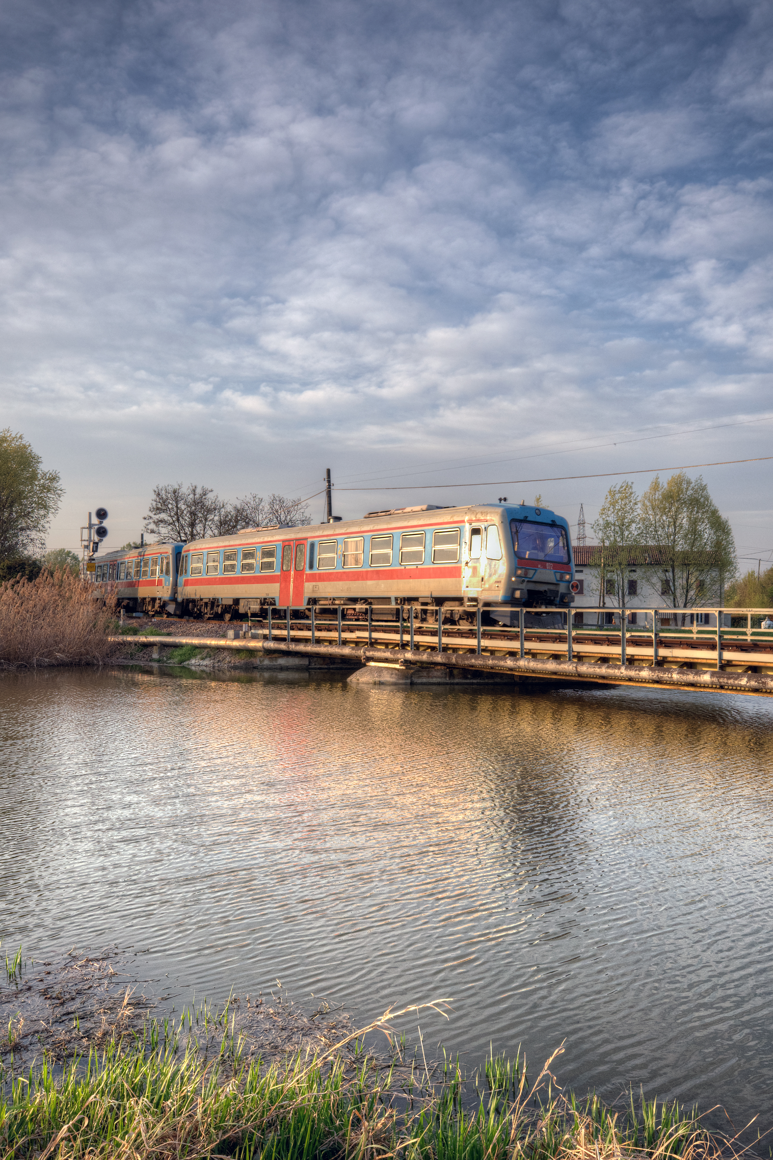 Treno Guastalla-Reggio sul Cavo Fiuma - Guastalla, Reggio Emilia, italia